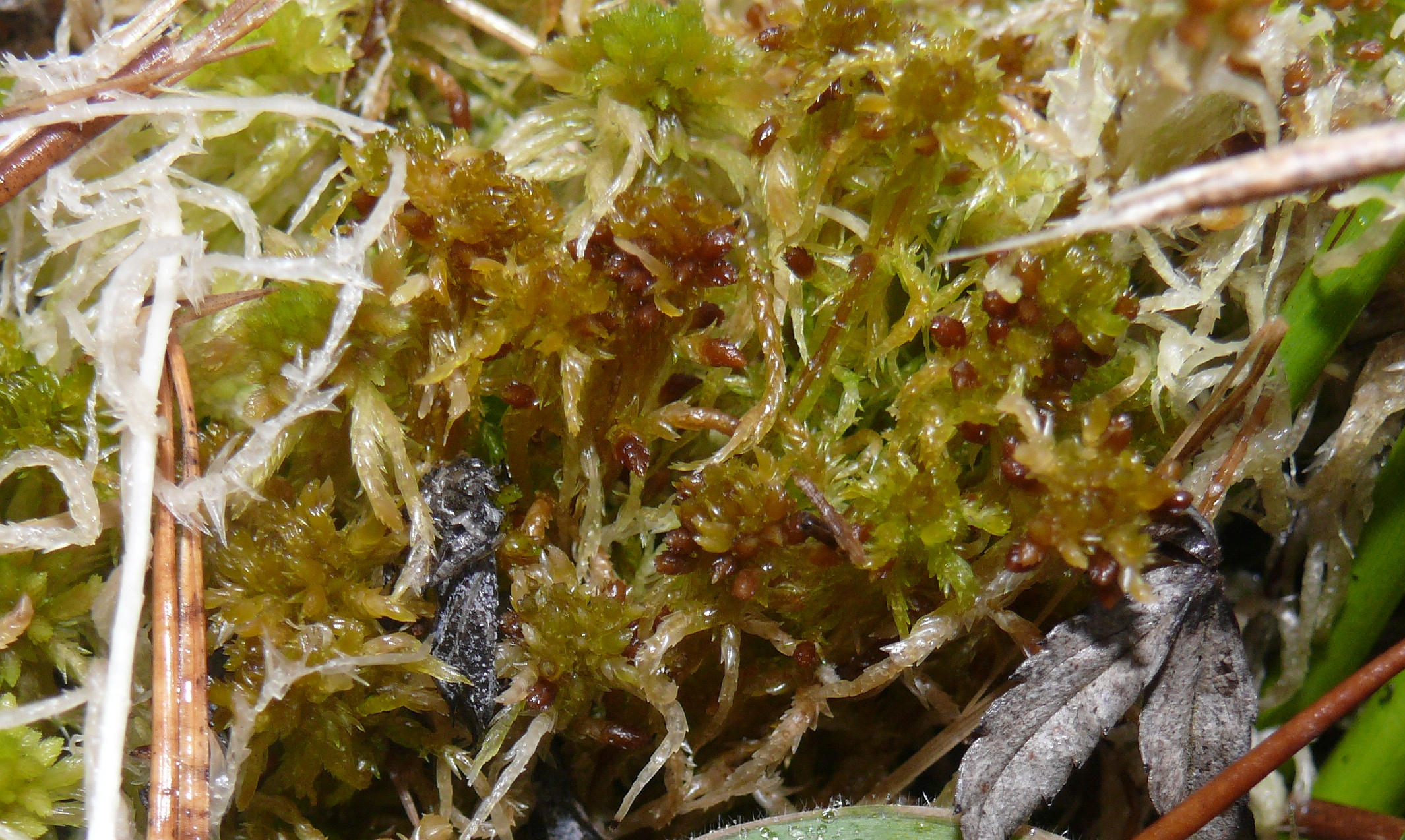 Sphagnum subsecundum, Virngrund, Germany